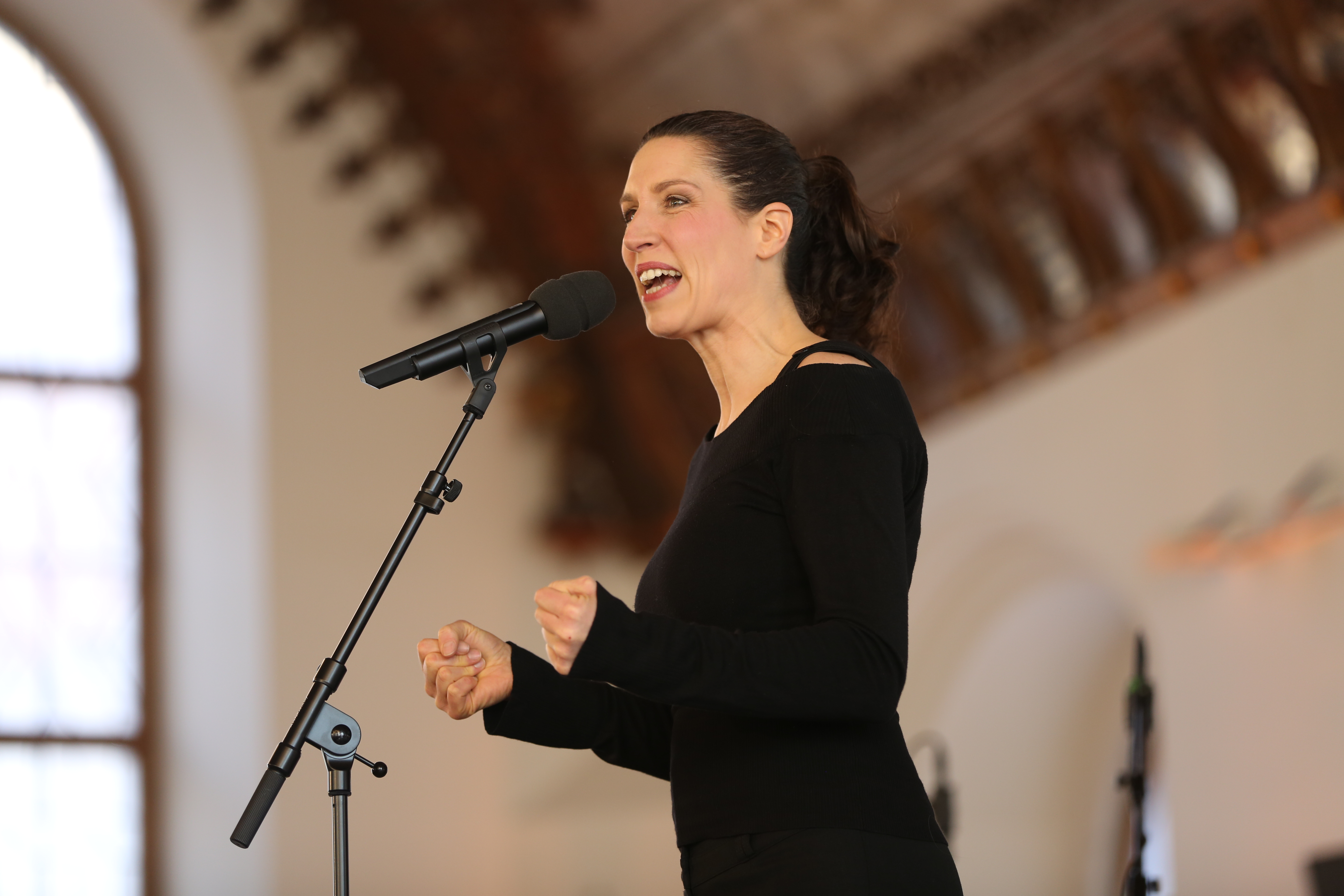 Verleihung des Dieter-Hildebrandt-Preises 2019 an Christine Prayon im Alten Rathaus. München